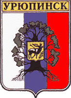 Герб города Урюпинска